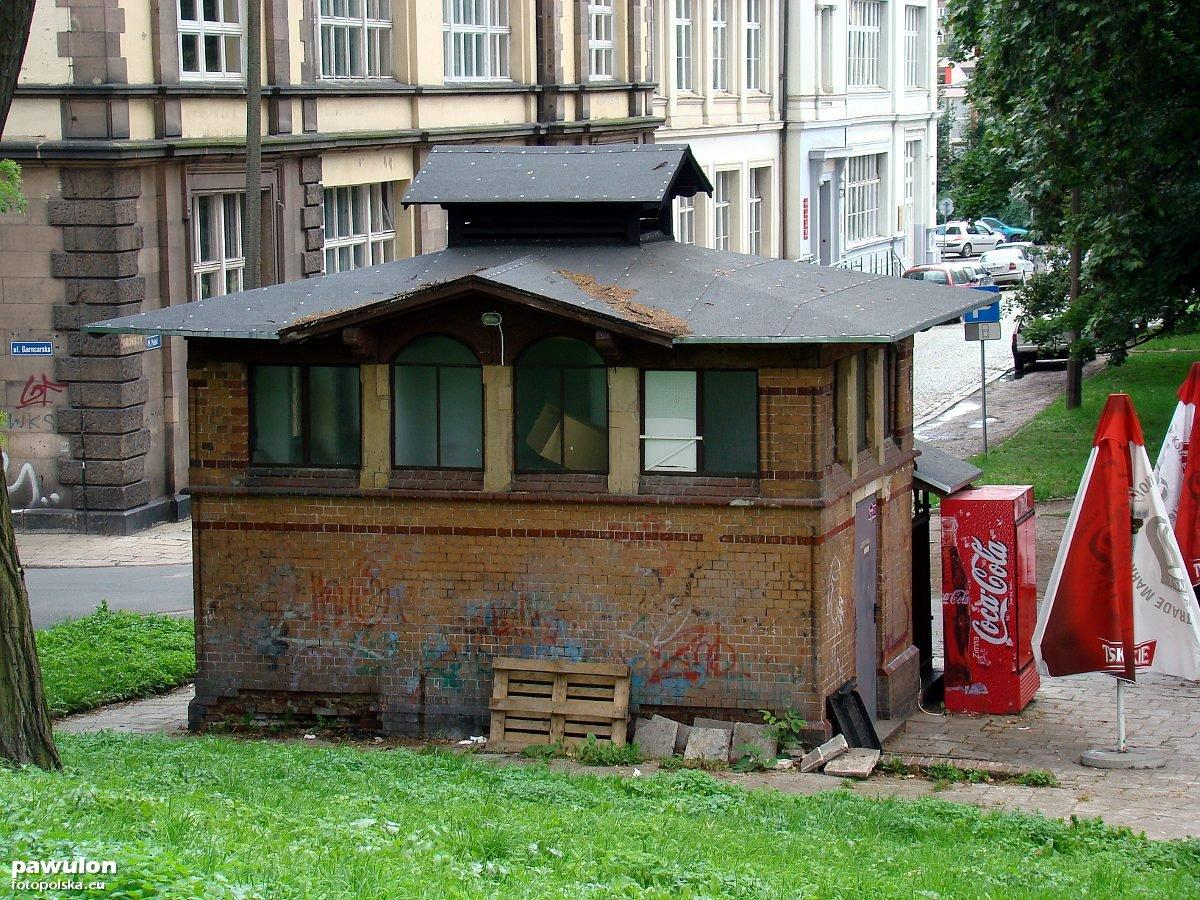 Dawny szalet a obecnie jakiś lokalik z napojami.